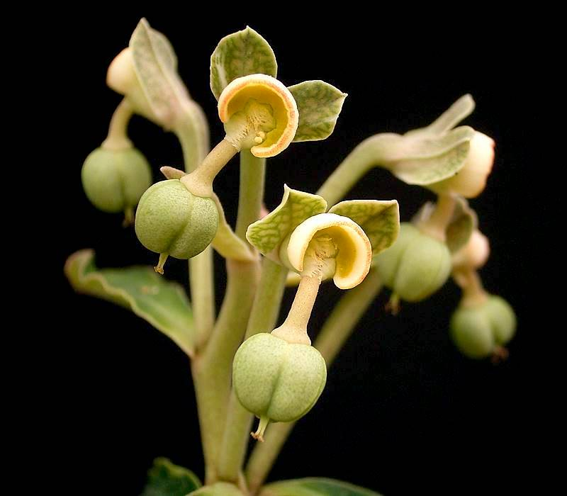 Euphorbia pseudoracemosa